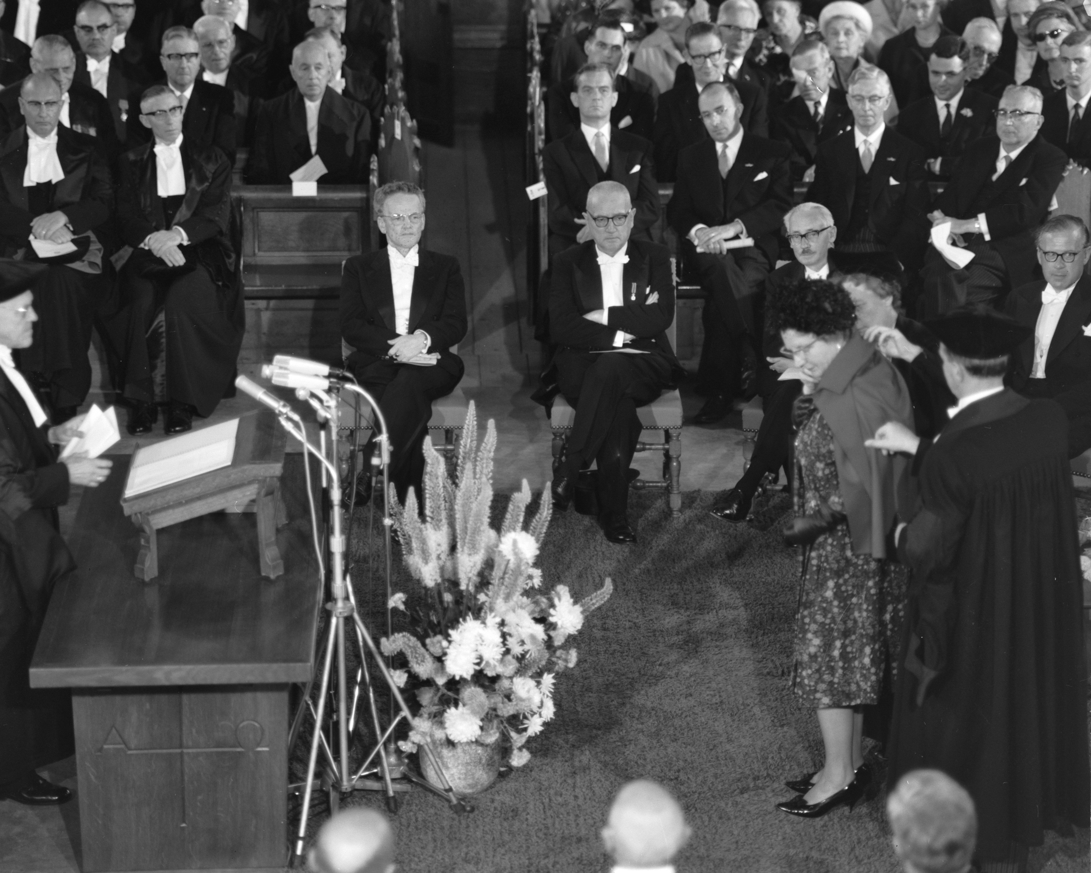 Collectie / Archief : Fotocollectie Anefo Reportage / Serie : [ onbekend ] Beschrijving : Eredoctoraat voor Koningin Juliana in Martinikerk te Groningen verleend, de kappa wordt de Koningin omgehangen door promotor prof. dr. P. J. Bouman Datum : 24 juni 1964 Locatie : Groningen Trefwoorden : eredoctoraten, koninginnen Persoonsnaam : Juliana, koningin, Prof. Dr. P. J. Bouman Instellingsnaam : Martinikerk Fotograaf : Bilsen, Joop van / Anefo Auteursrechthebbende : Nationaal Archief Materiaalsoort : Negatief (zwart/wit) Nummer archiefinventaris : bekijk toegang 2.24.01.04 Bestanddeelnummer : 916-5728